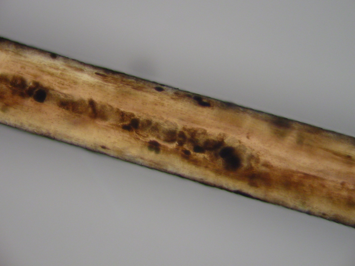 les pigments se rassemblent en mottes au centre du cheveu